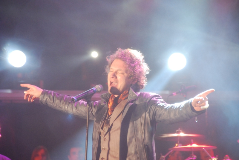 Matteo Becucci al concerto finale della seconda edizione di X Factor a Trento.